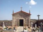 chapelle santa barbara, macieira, sernancelhe